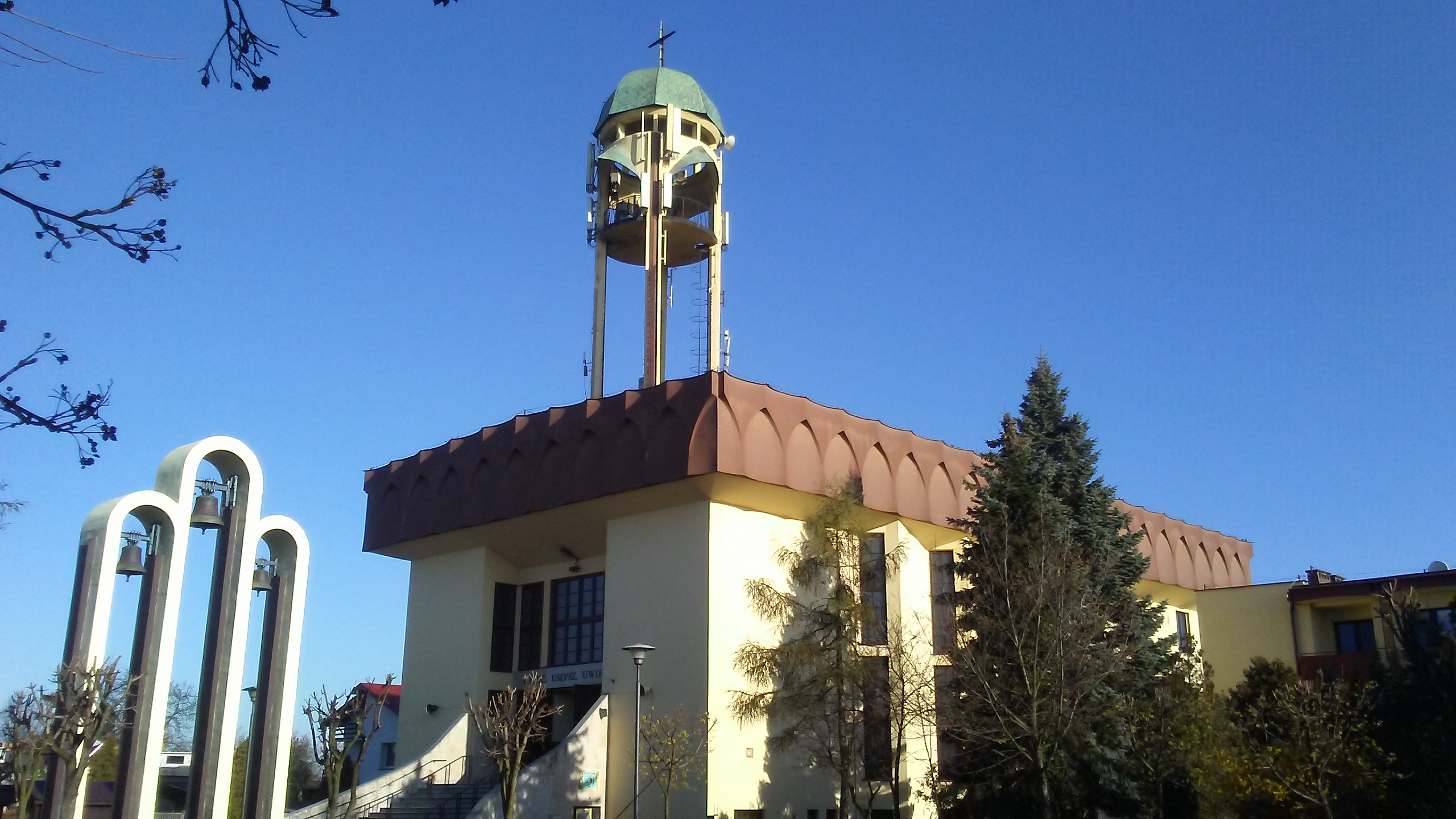 Kościół rzymskokatolicki przy ulicy Niskiej w Tomaszowie Mazowieckim